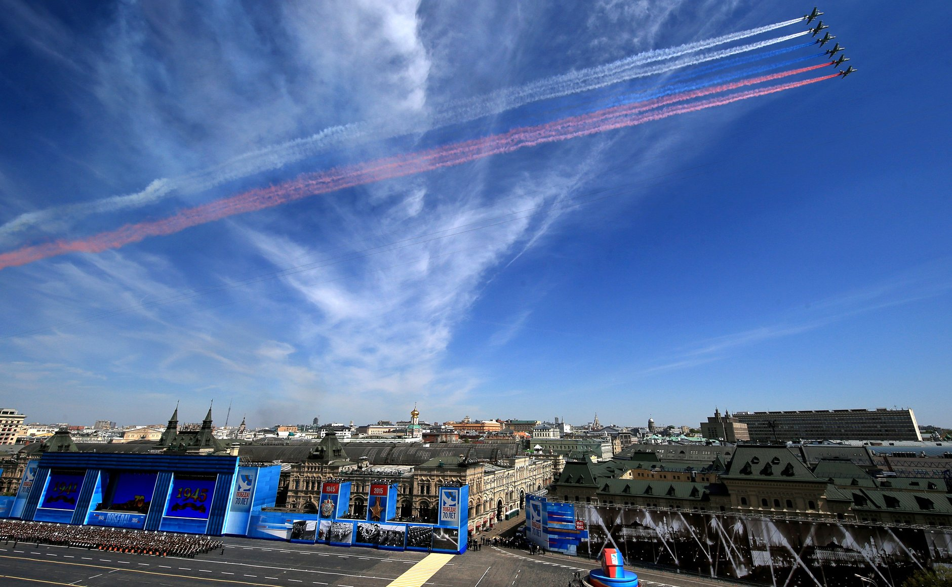 Штурмовики Су-25 во время военного парада в ознаменование 70-летия Победы в Великой Отечественной войне 1941–1945 годов.